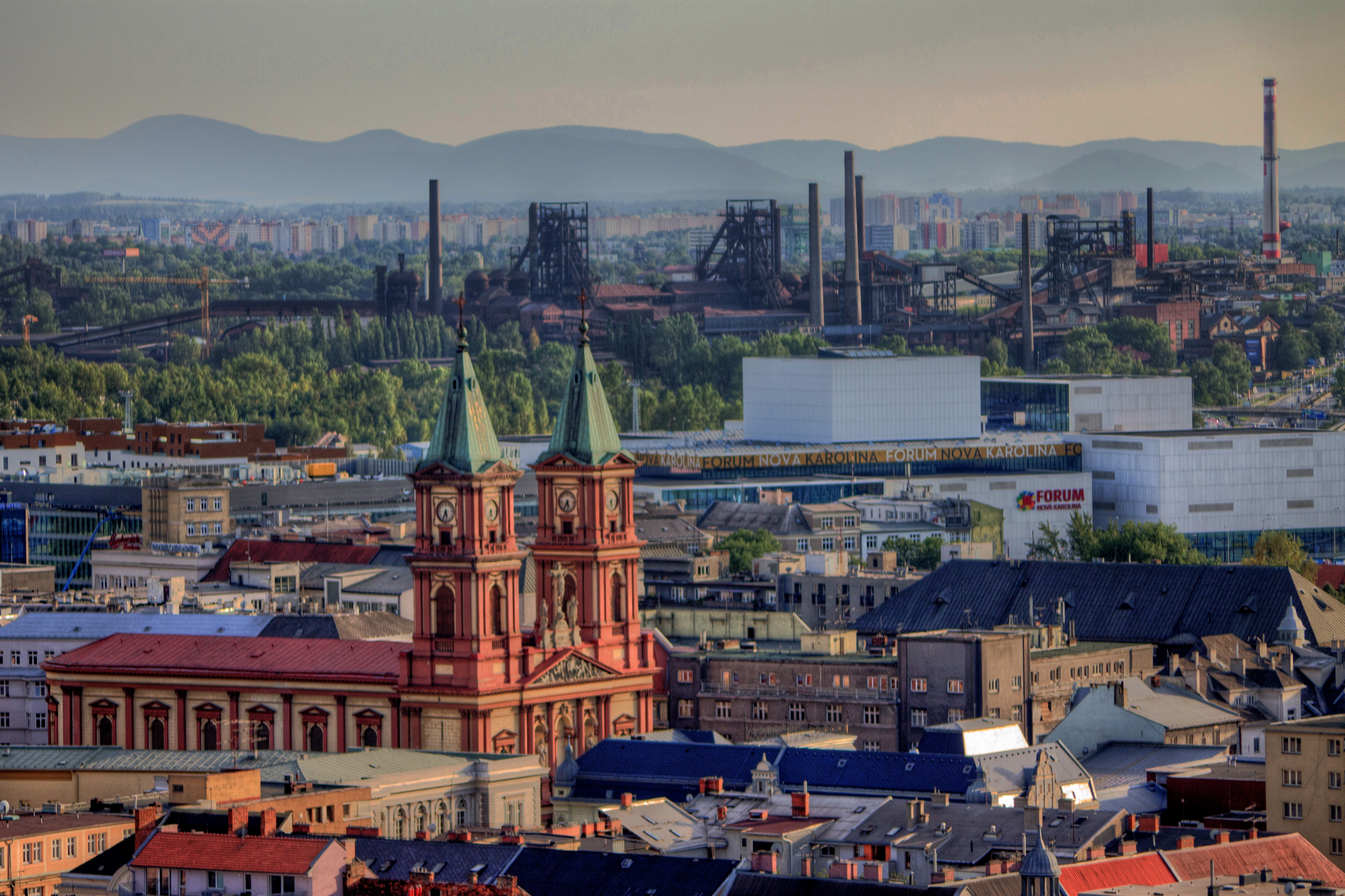 Kostel Božského spasitele (Ostrava), Moravská Ostrava, Ostrava